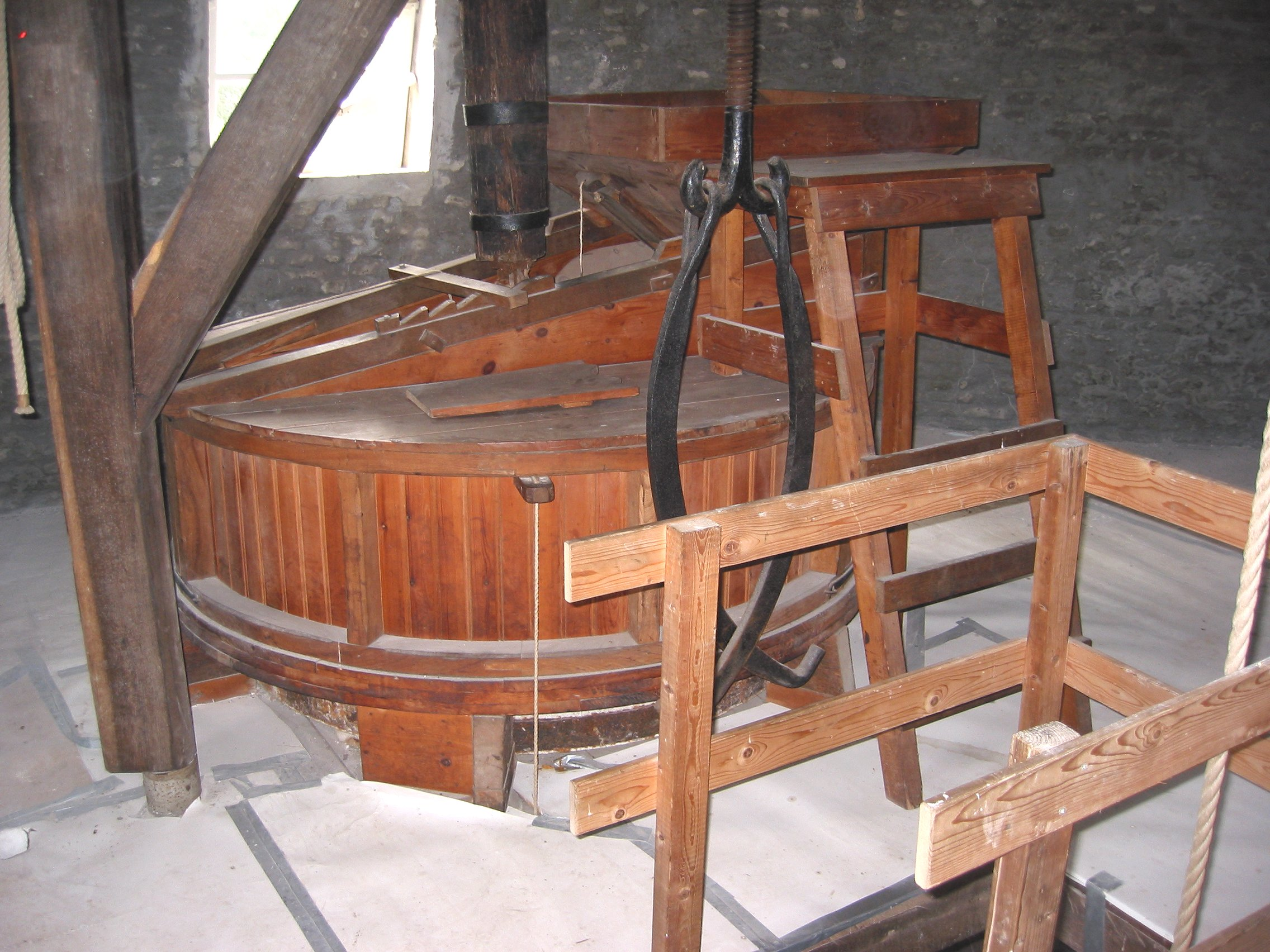 Maalstoel van De Keetmolen Ede, Nederland